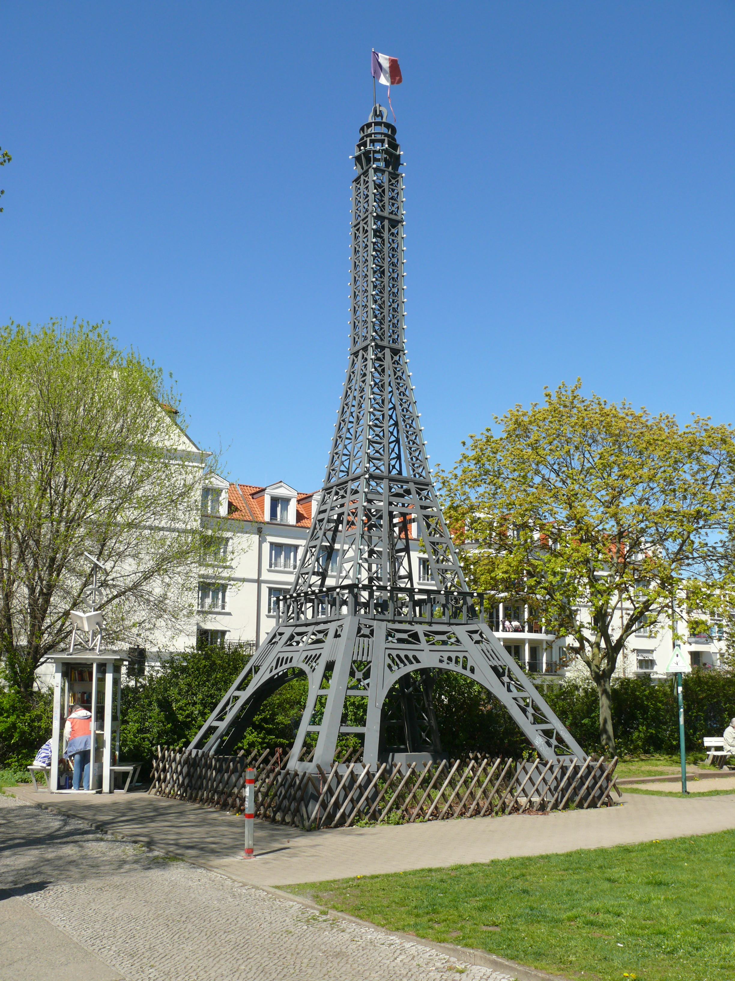 Berlin-Wedding Centre Francais Eiffelturm